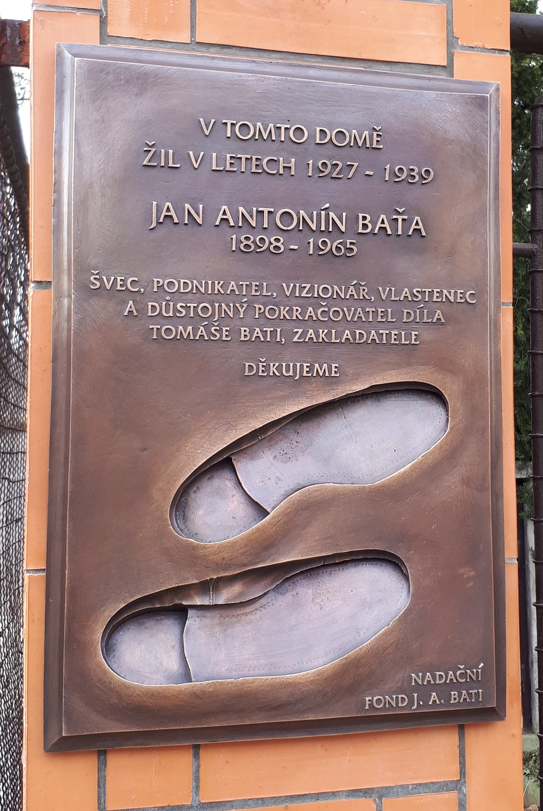 Pamětní deska na vile J.a.Bati ve Zlíně